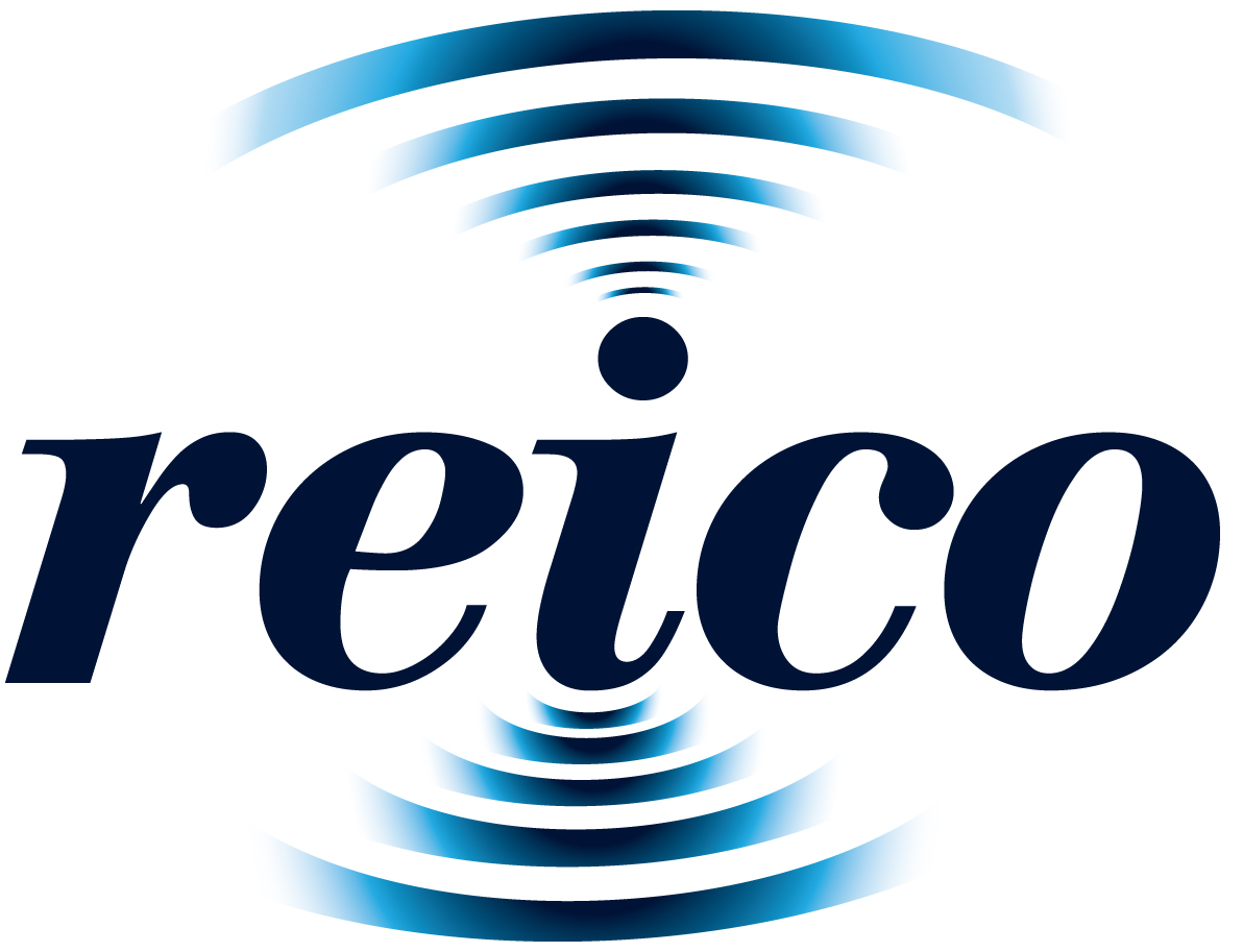 Logo de Redes Inalambricas de Costa Rica